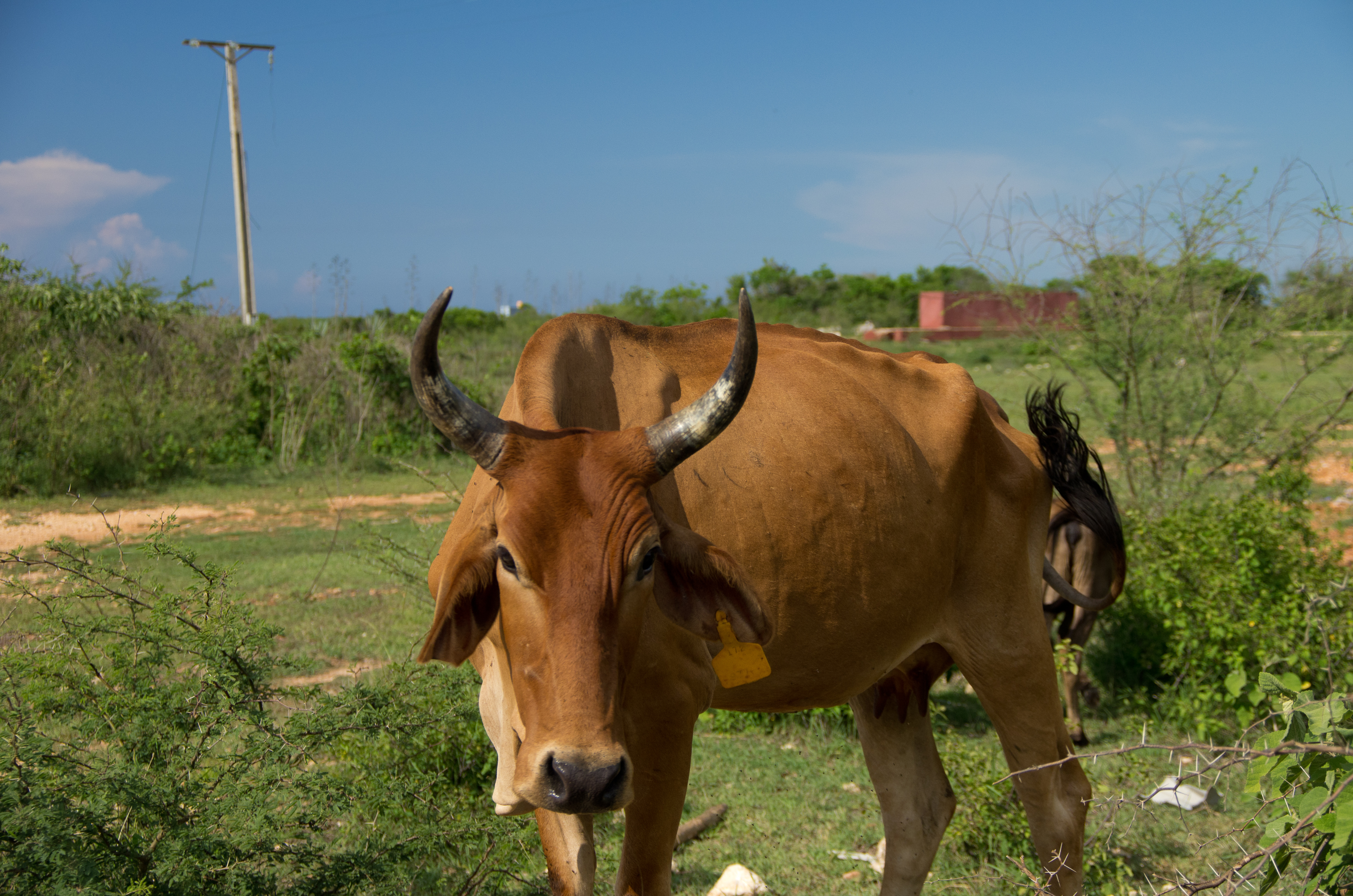 18 juillet 2011 (K5_02119)